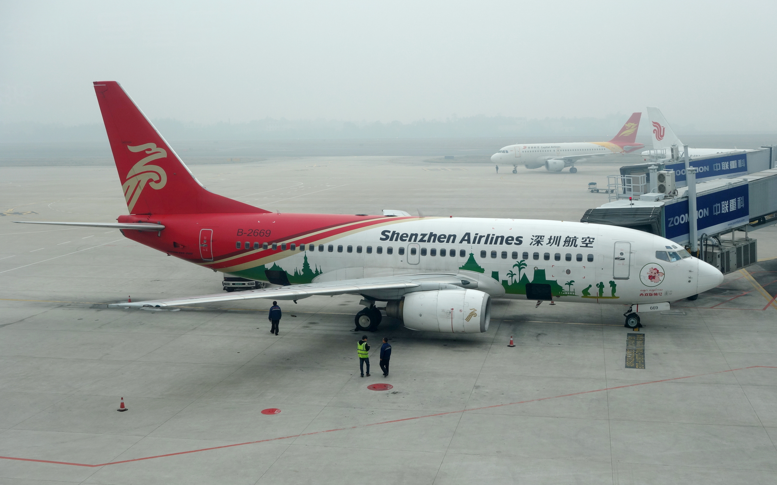 深圳航空公司2001年引进的波音737-77L型客机 (注册号B-2669), 西双版纳号彩绘涂装, 在长沙黄花国际机场.